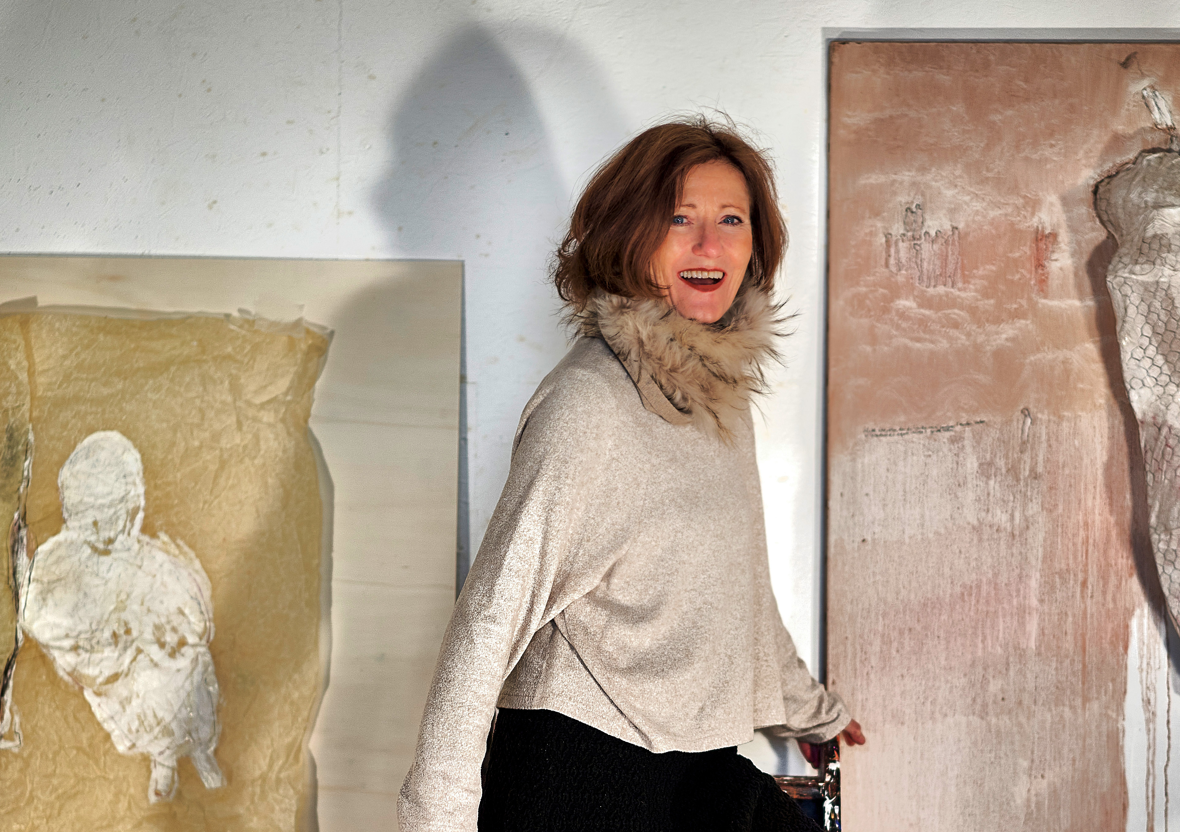 Sylvia K. Kummer mit ihren Werken